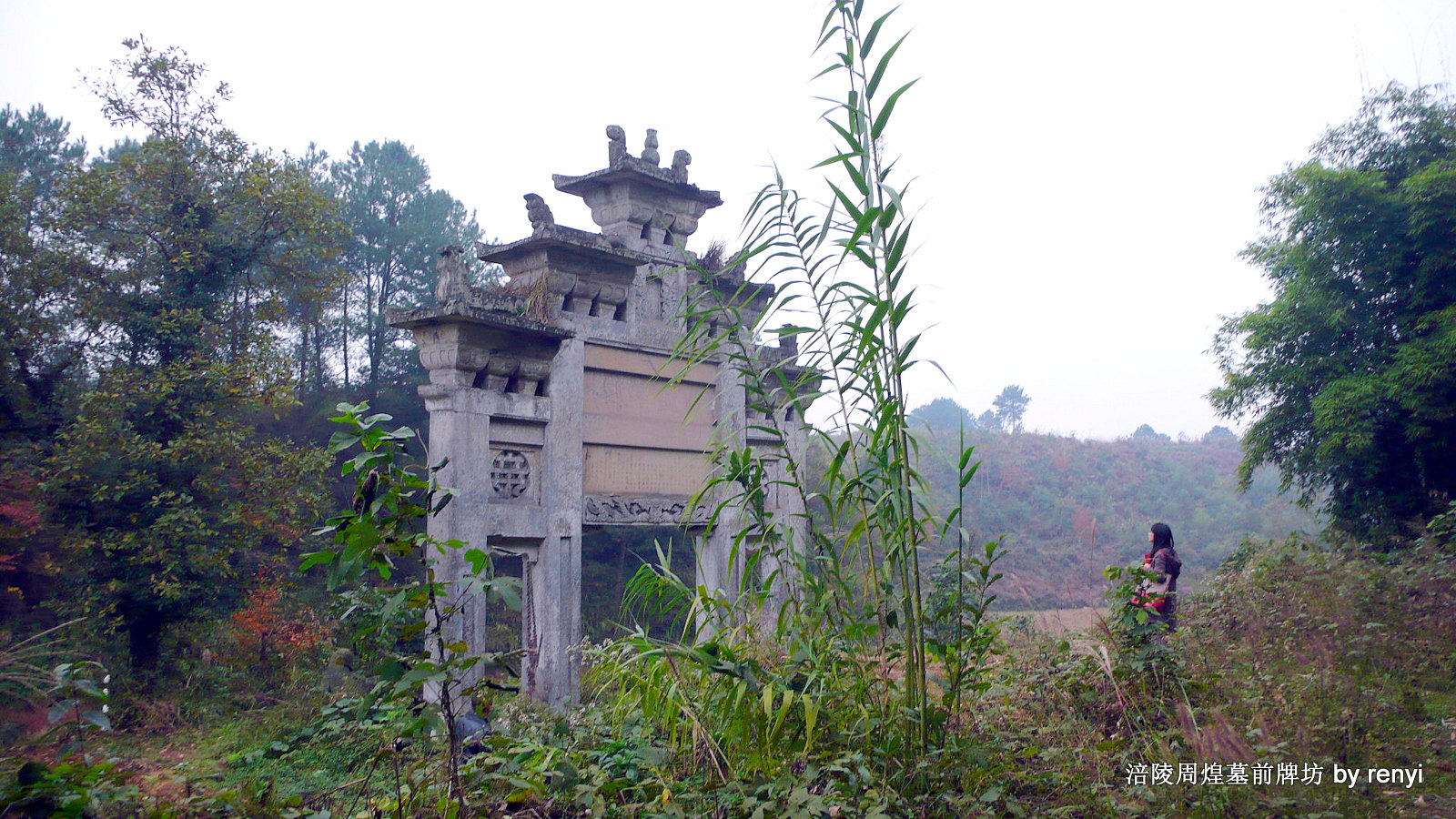 重慶涪陵周煌墓前牌坊